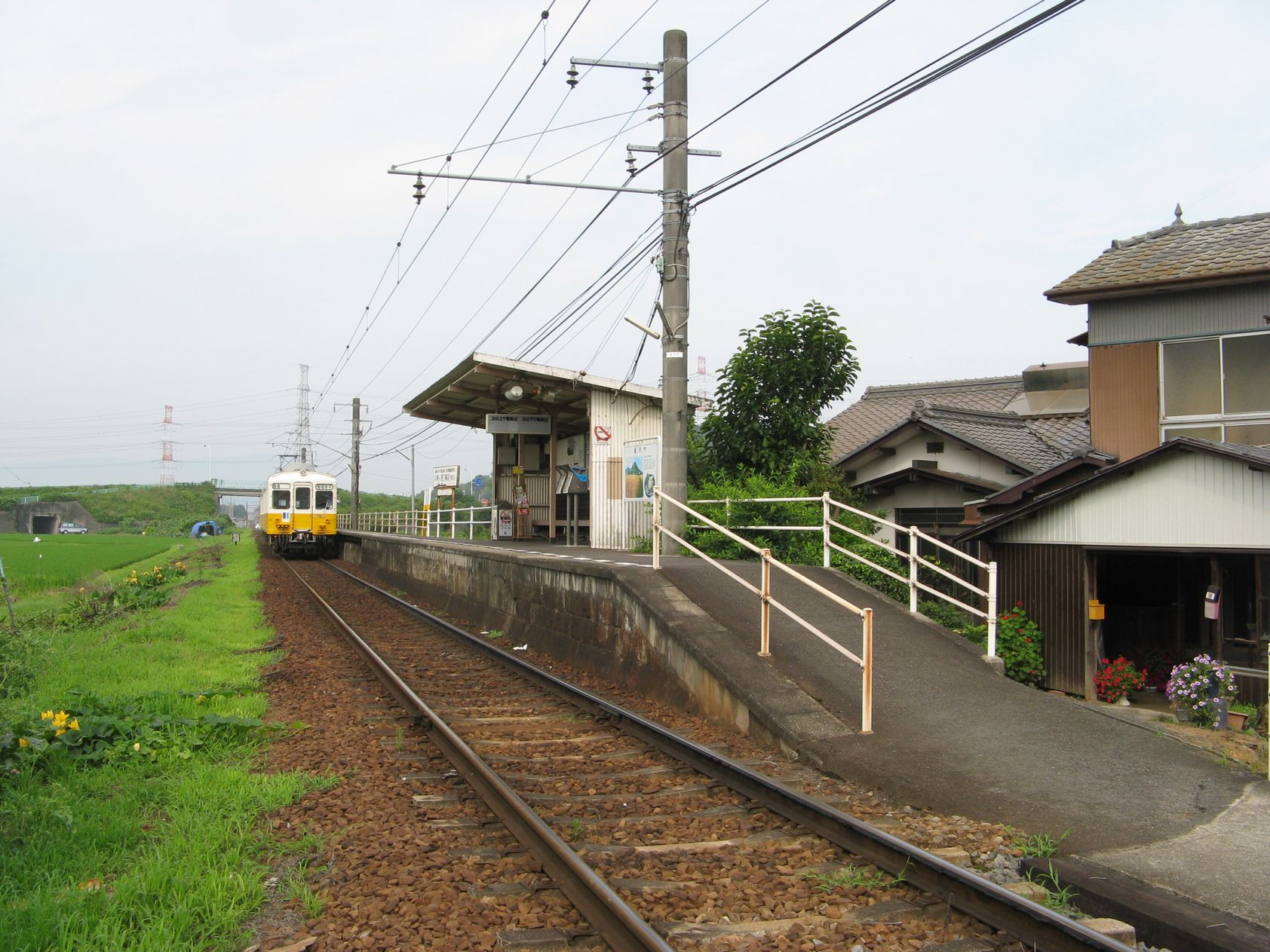 羽床駅 構内を西望